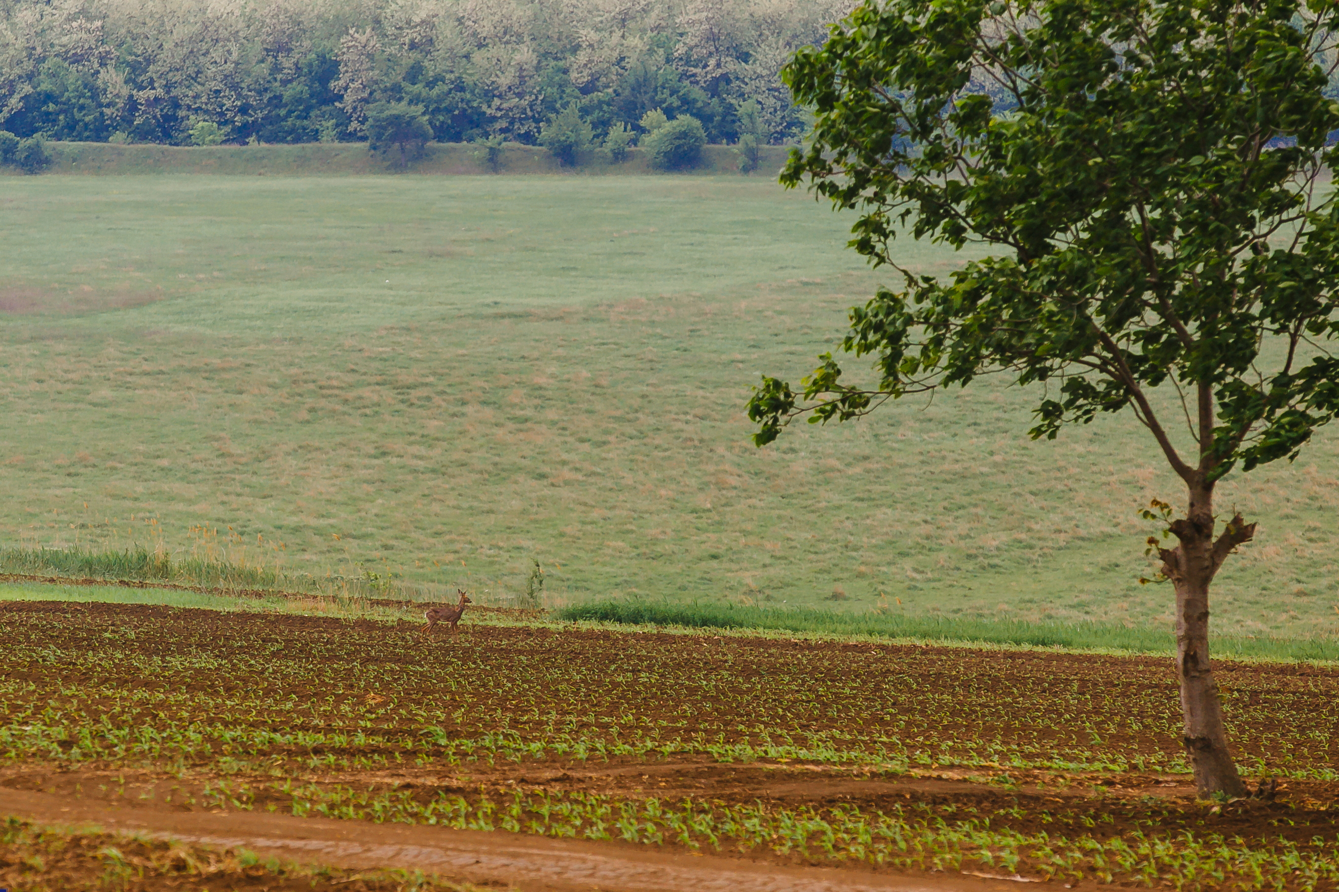 Valea Mare, monument al naturii amplasat în raionul Ungheni, la sud de orașul Ungheni, ocolul silvic Ungheni, Valea Mare, parcela 25; Moreni-Balta, parcelele 26, 27 (cod MD-UN-rp-041)